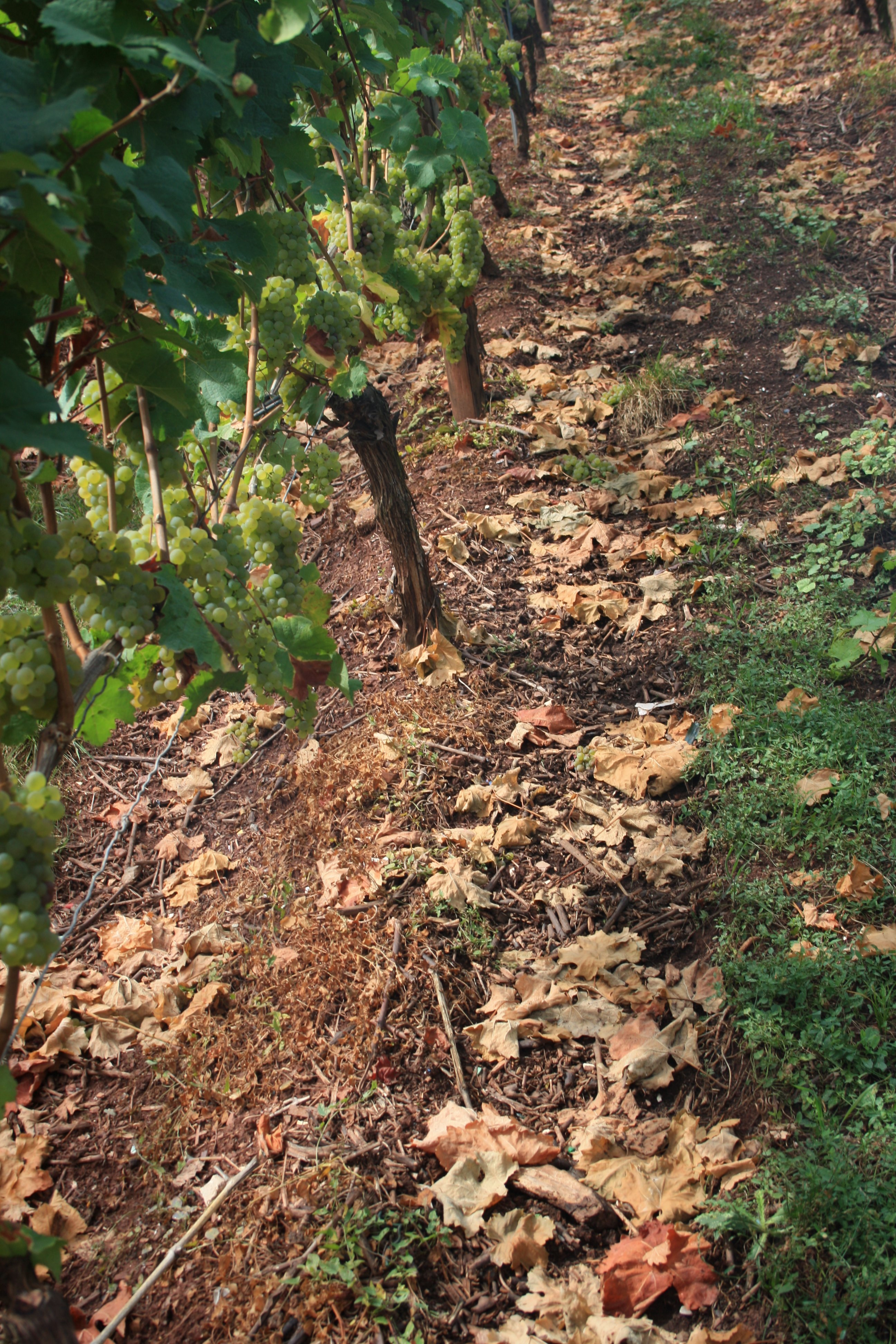 Weinberge Nierstein Entlaubung der Traubenzone